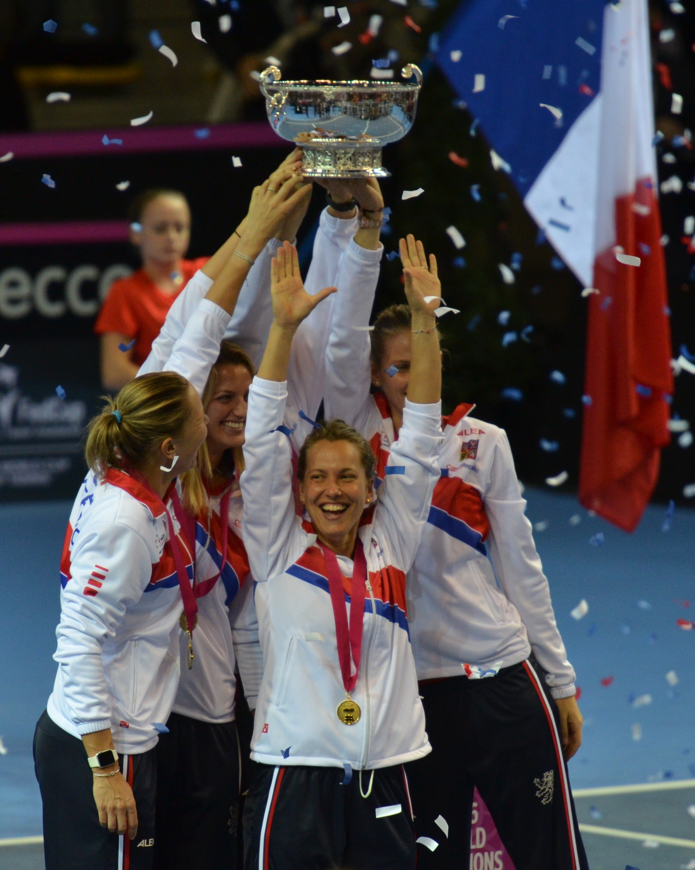 PPP_3509